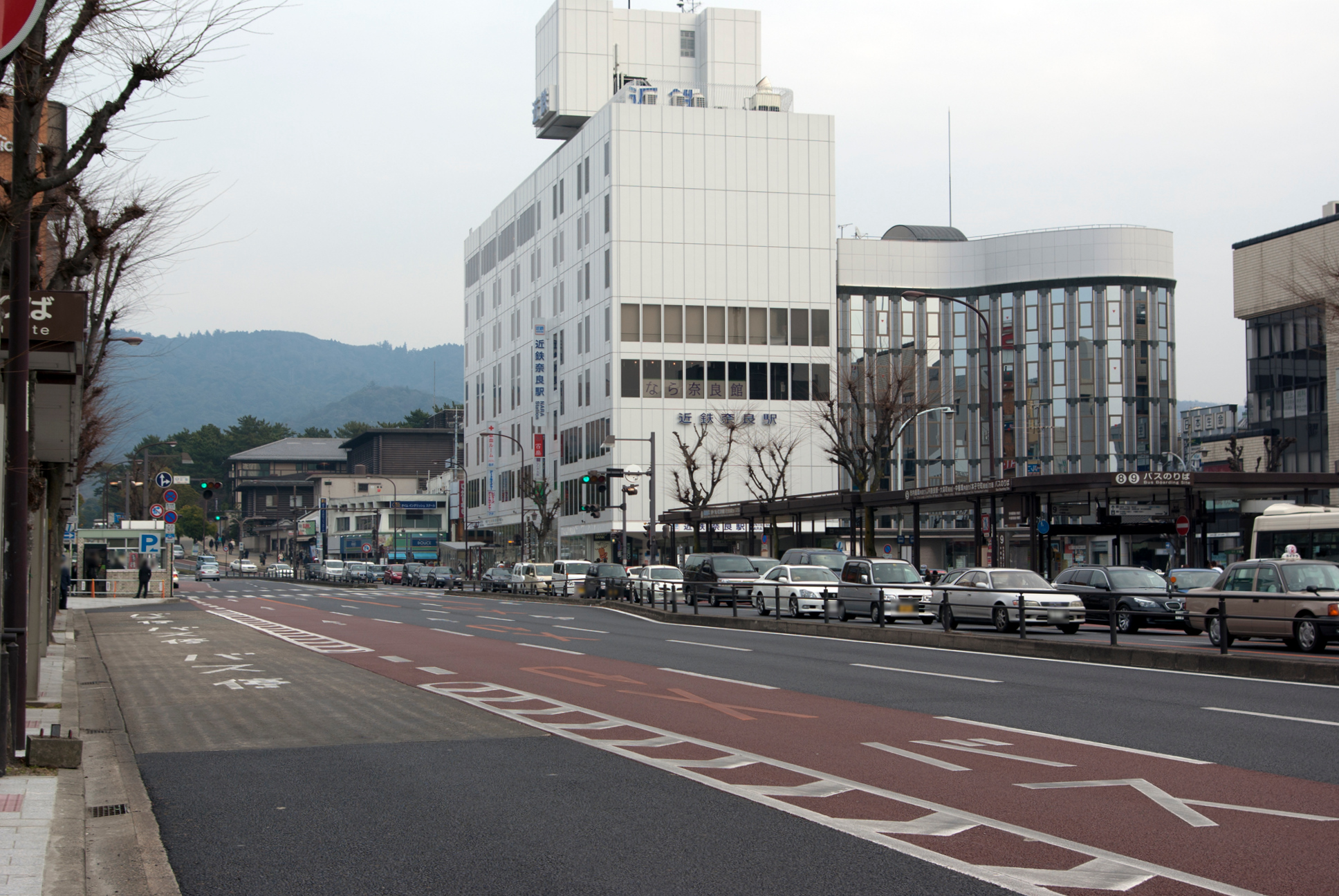 近鉄奈良線近鉄奈良駅